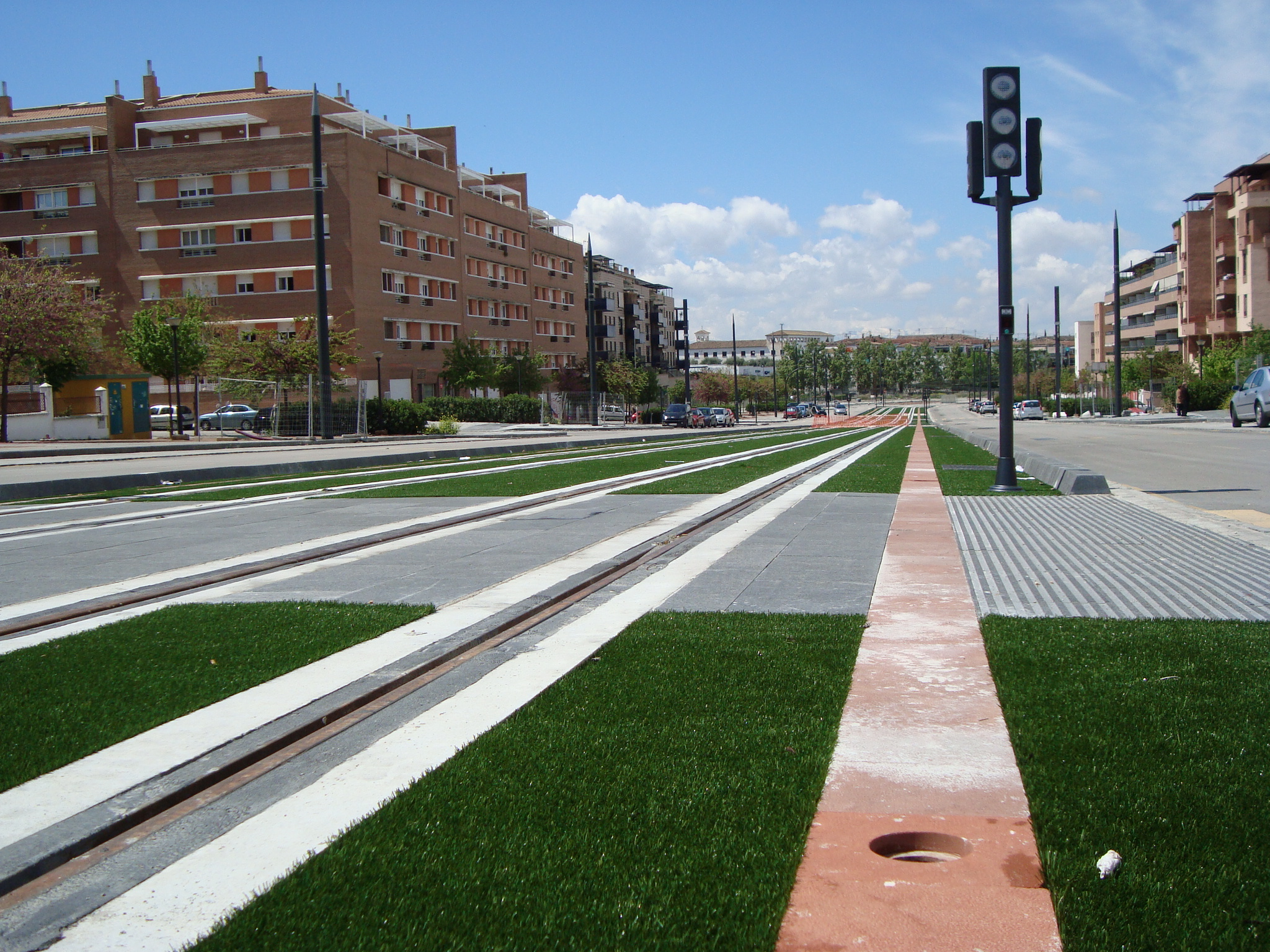 La calle San Sebastían de la Gomera del Barrio de Albayda con los trabajos del metropolitano casi finalizados.